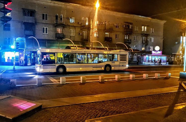 Запоріжжя. Площа ім. Олександра Поляка